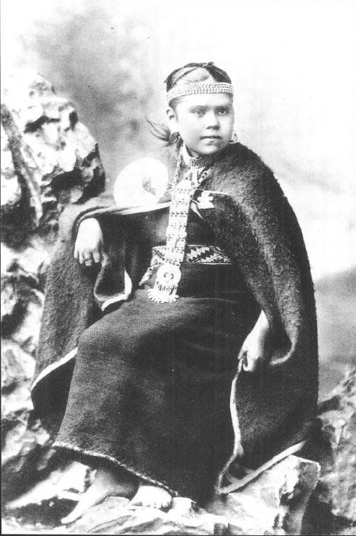 Hija del Cacique Mapuche Quilpran